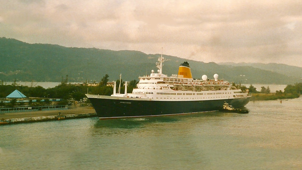 Hafen Montego Bay Jamaika Karibik